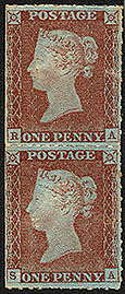 Archer-Zähnung, 1848 Quelle: Bild aus der englischen Wikipedia (Image:Roulette.jpg)